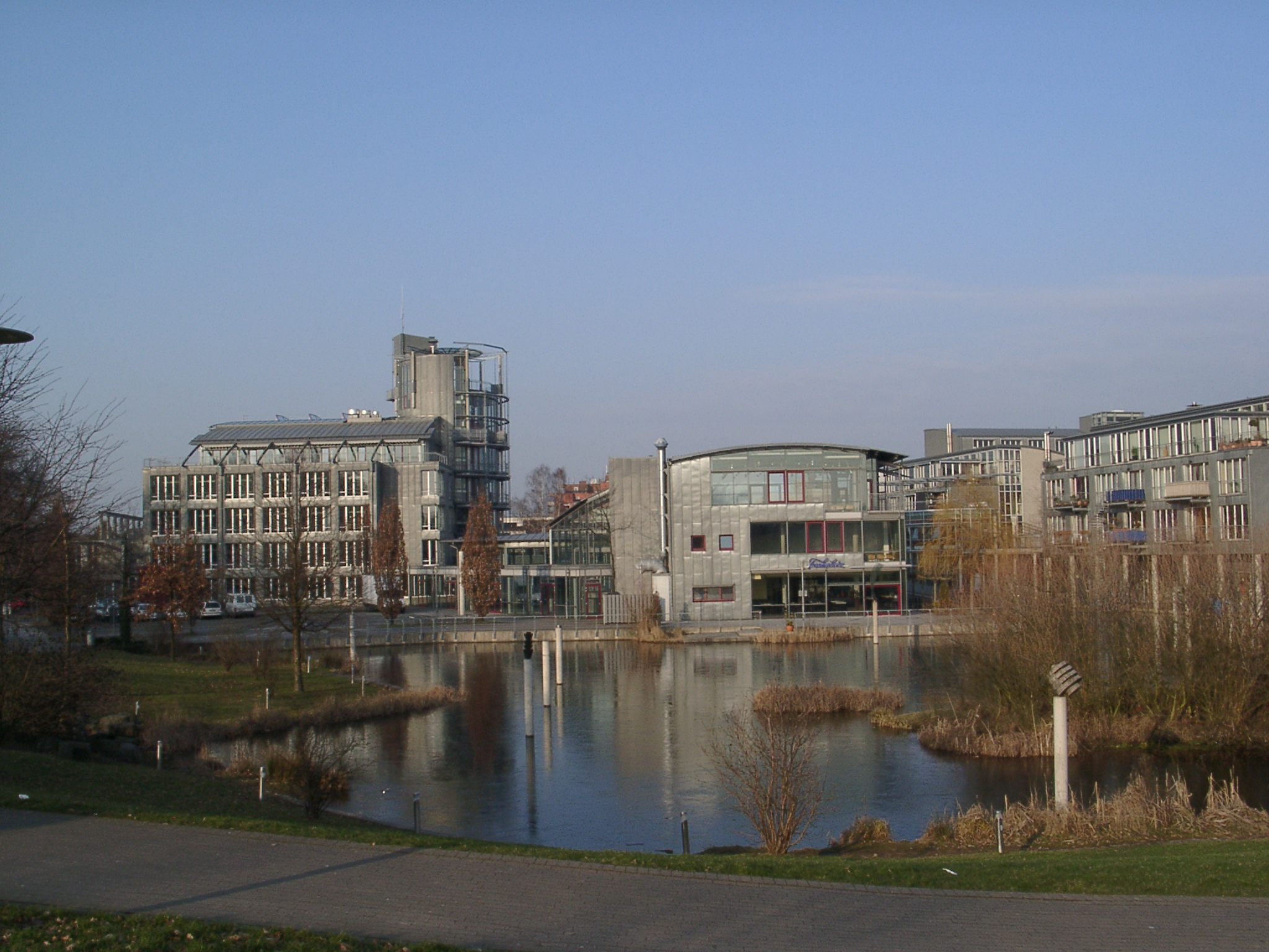 Kaarst Ortsmitte